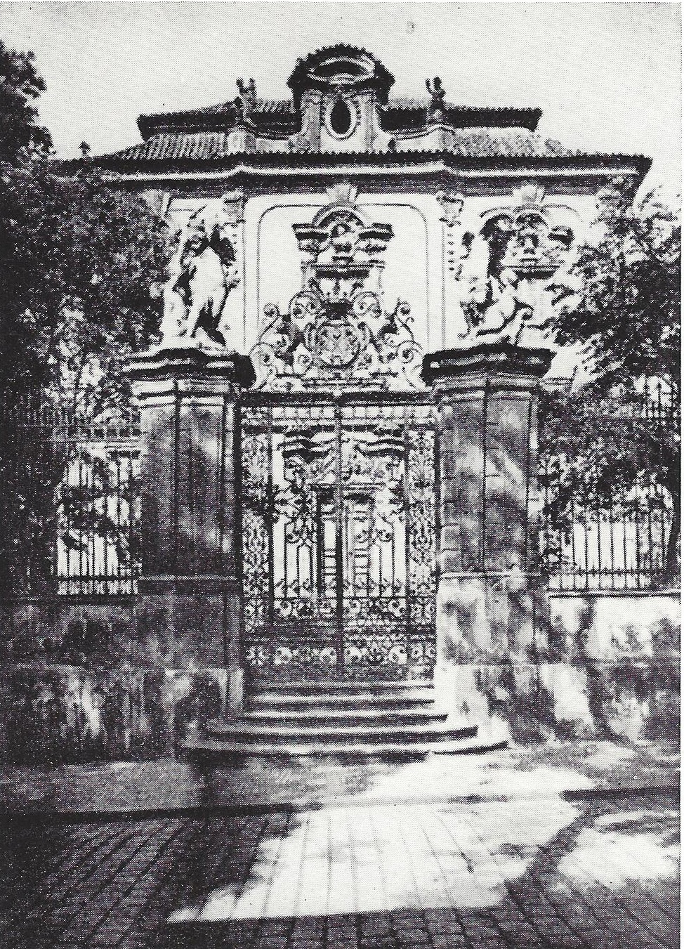 Villa Amerika in der Karlshofer Gasse in Prag. Erbaut 1720 von Ignaz Dientzenhofer. Bis 1880 Bude der prager Burschenschaft Albiaund allgemeines Mensurlokal der Prager Korporationen.